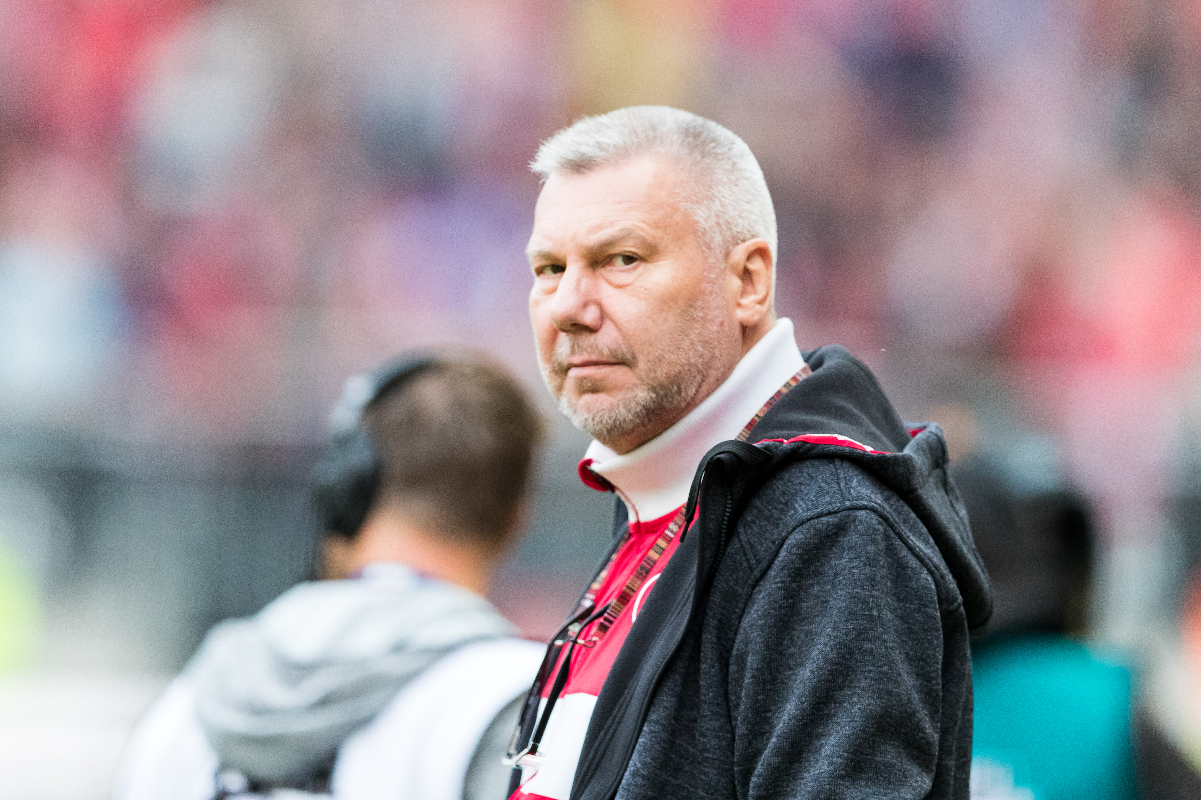 during 1.FC Kaiserslautern vs FC Bayern München at Fritz-Walter-Stadion, Kaiserslautern, Rheinland-Pfalz, Germany on 2019-05-27, Photo: Sven Mandel